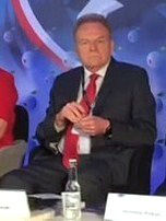 Andrzej Malinowski, polityk i działacz gospodarczy.